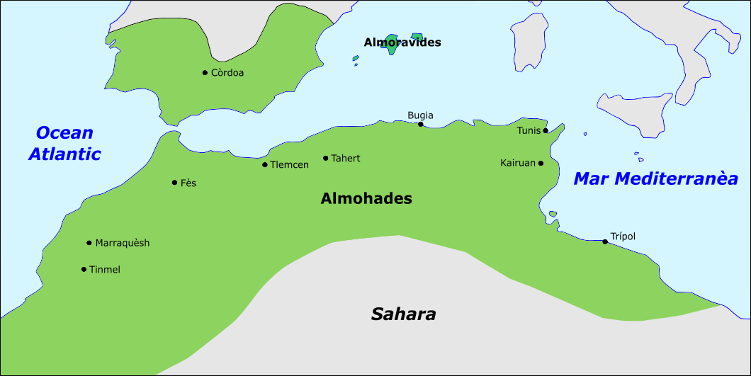 Territòri deis Almohades a la fin dau sègle XII.